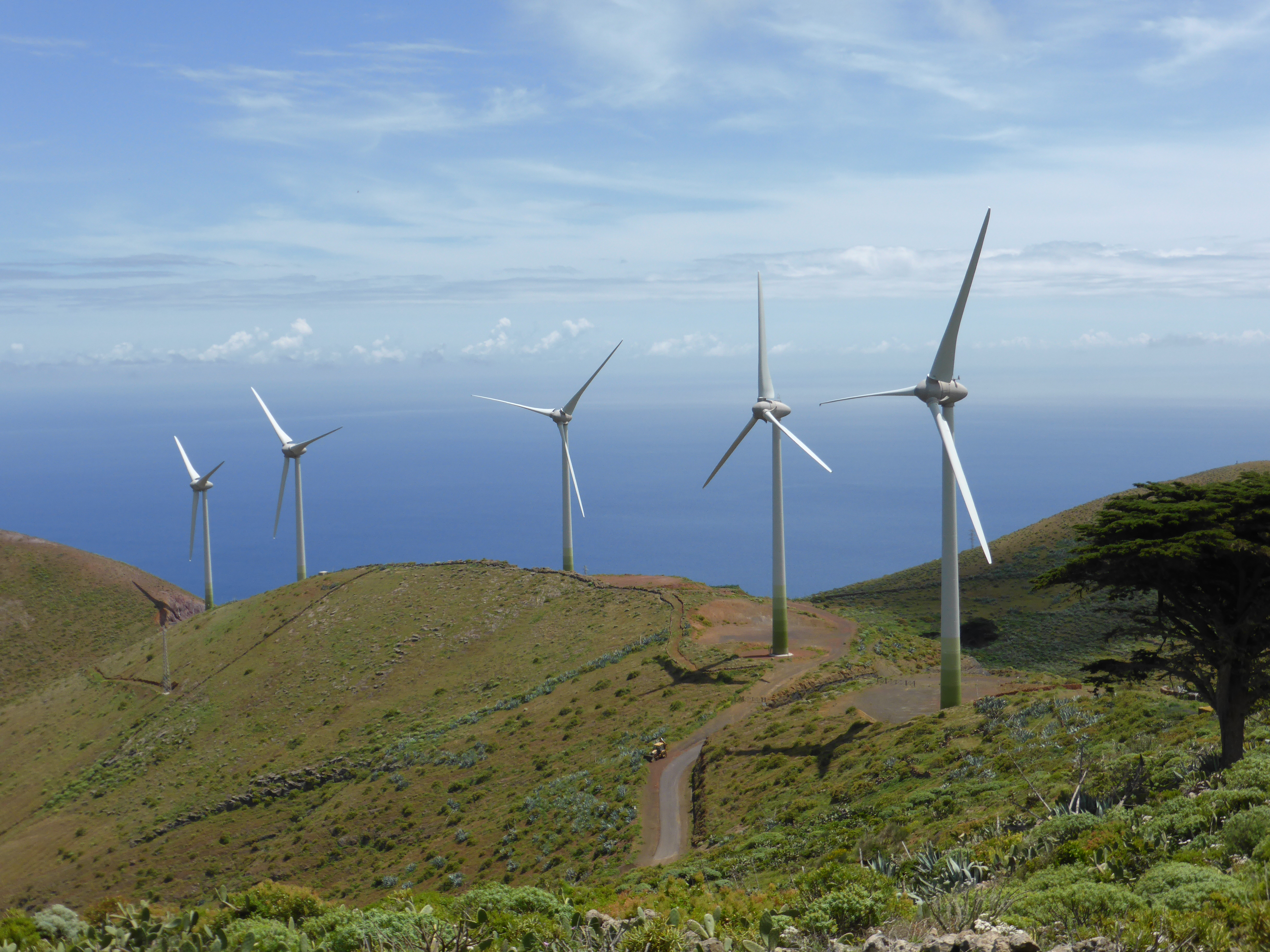 En el verano de 2014 está previsto que funcione el nuevo parque eólico de la isla de El Hierro. Forma parte de la Central Hidroeólica, que teóricamente podría abastecer casi totalmente de energía eléctrica de fuentes renovables. Este macroproyecto es posible con grandes subvenciones. Una central diésel actúa como reserva. Los cinco aerogeneradores han sido fabricados por la empresa alemana Enercon. Son del modelo E-70, cada uno con potencia nominal de 2,3 megavatios (2,3 MW).